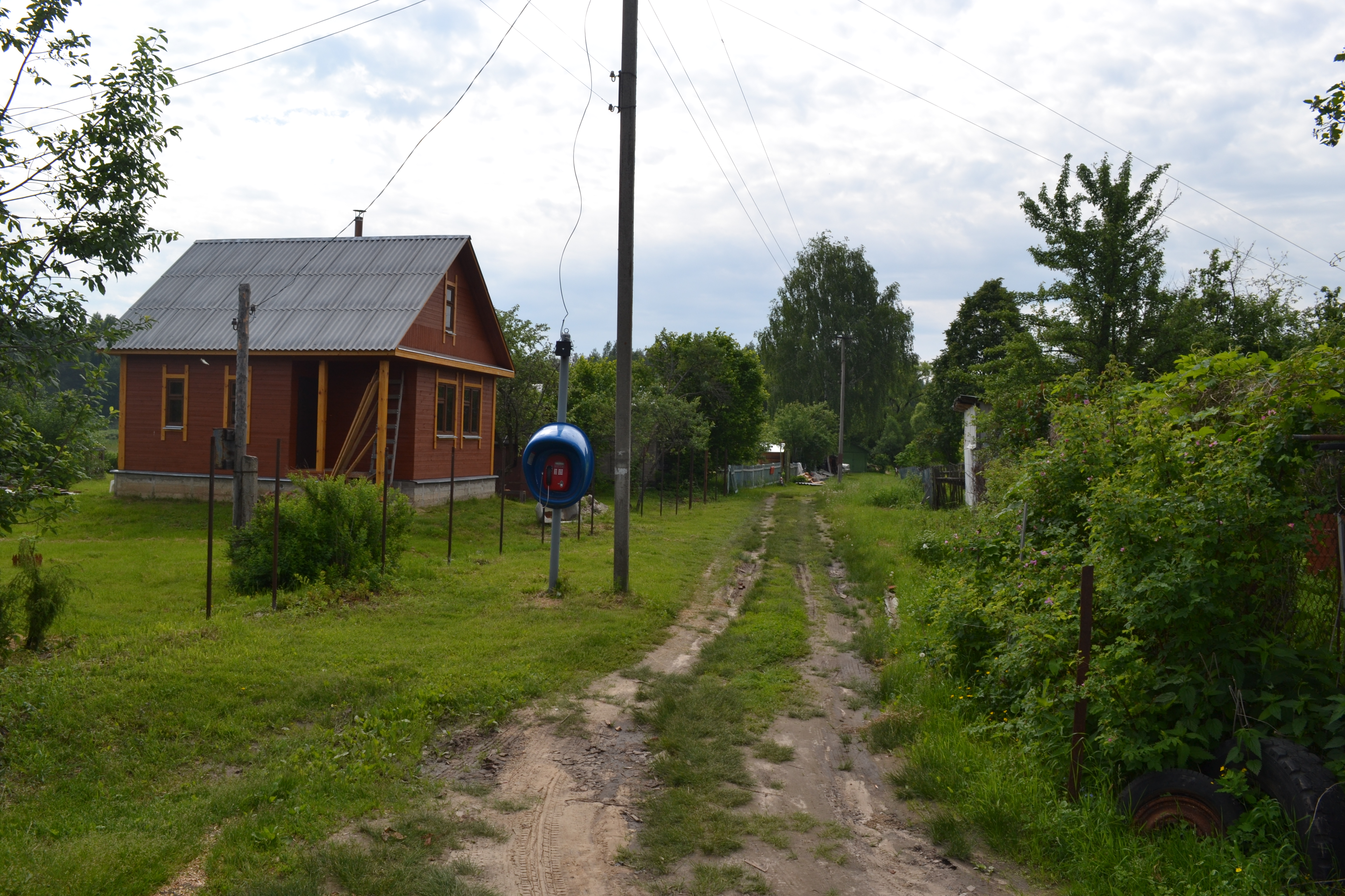 Телефон в Евлево (Шатурский район)